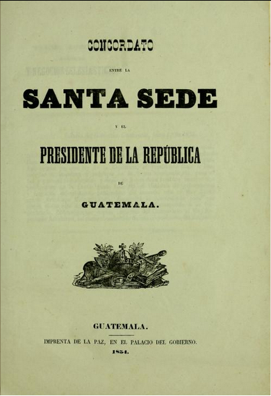 Concordato de Santa Sede con el Capitán Rafael Carrera y Turcios en 1854, fue publicada durante el mandato de Carrera en 1854.